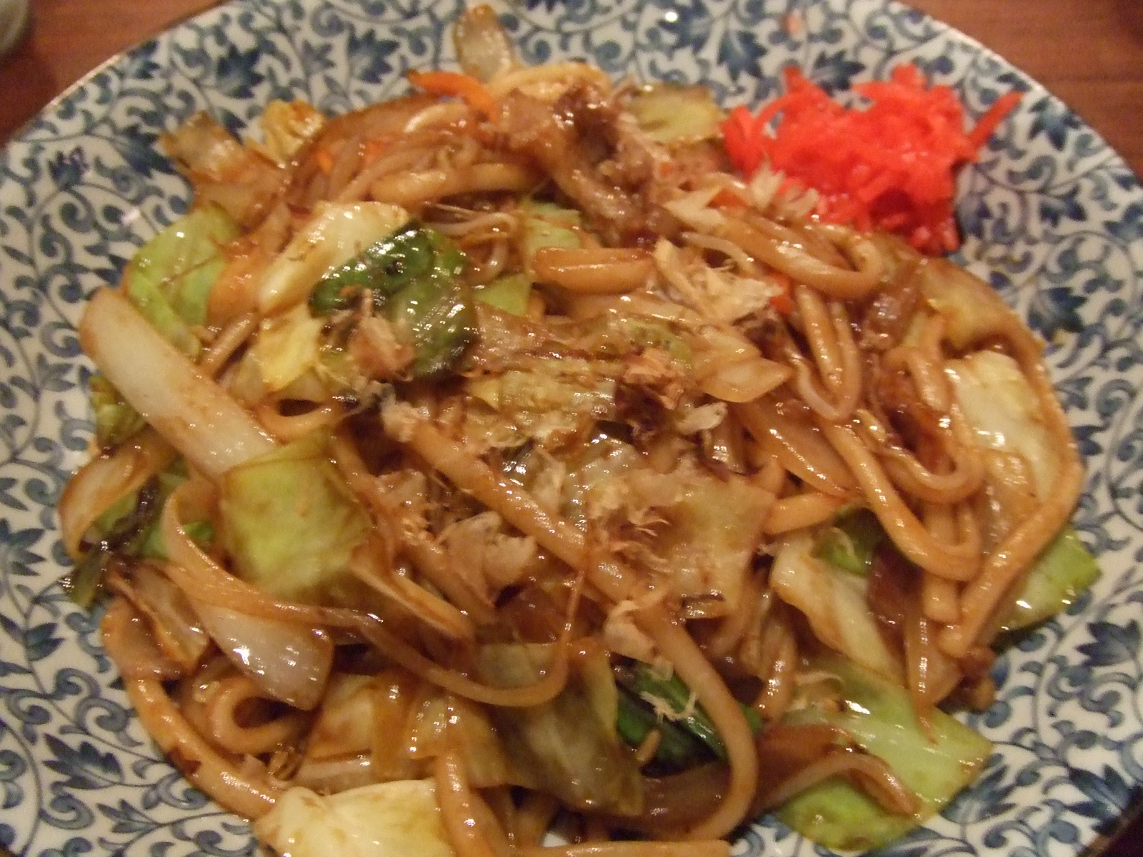 焼うどん（イベリコ豚入り）